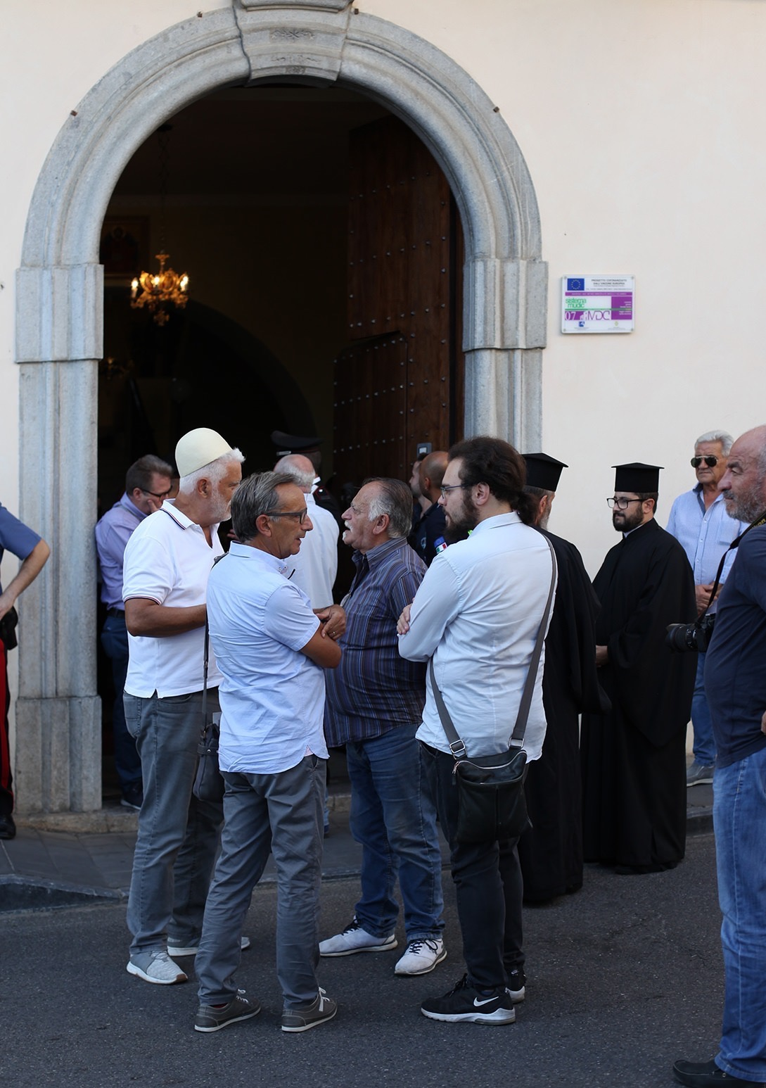 Storica visita a Lungro di Bartolomeo I. Momento prima della Divina Liturgia. Centenario dell'Eparchia (1919 - 2019). Foto di Italo Elmo.